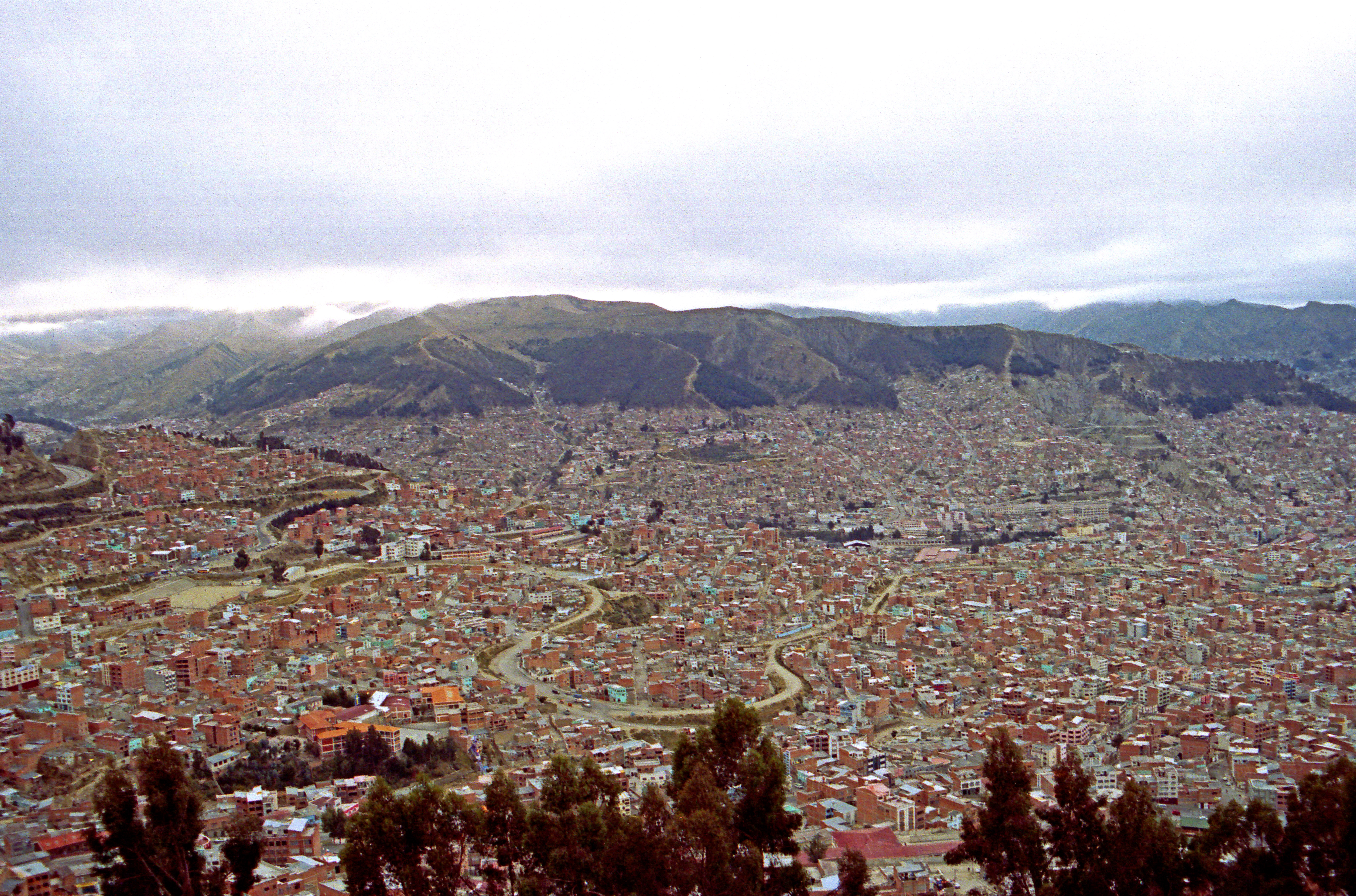 Bolivia-09